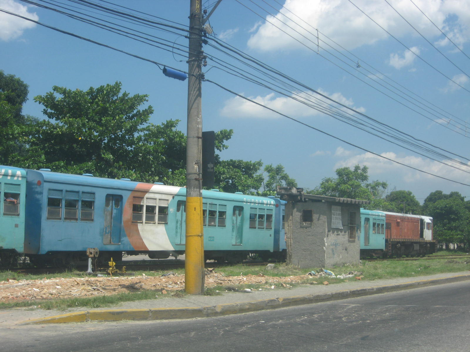 Vista do Ramal Vila Inhomirim, Rio de Janeiro, Brasil.